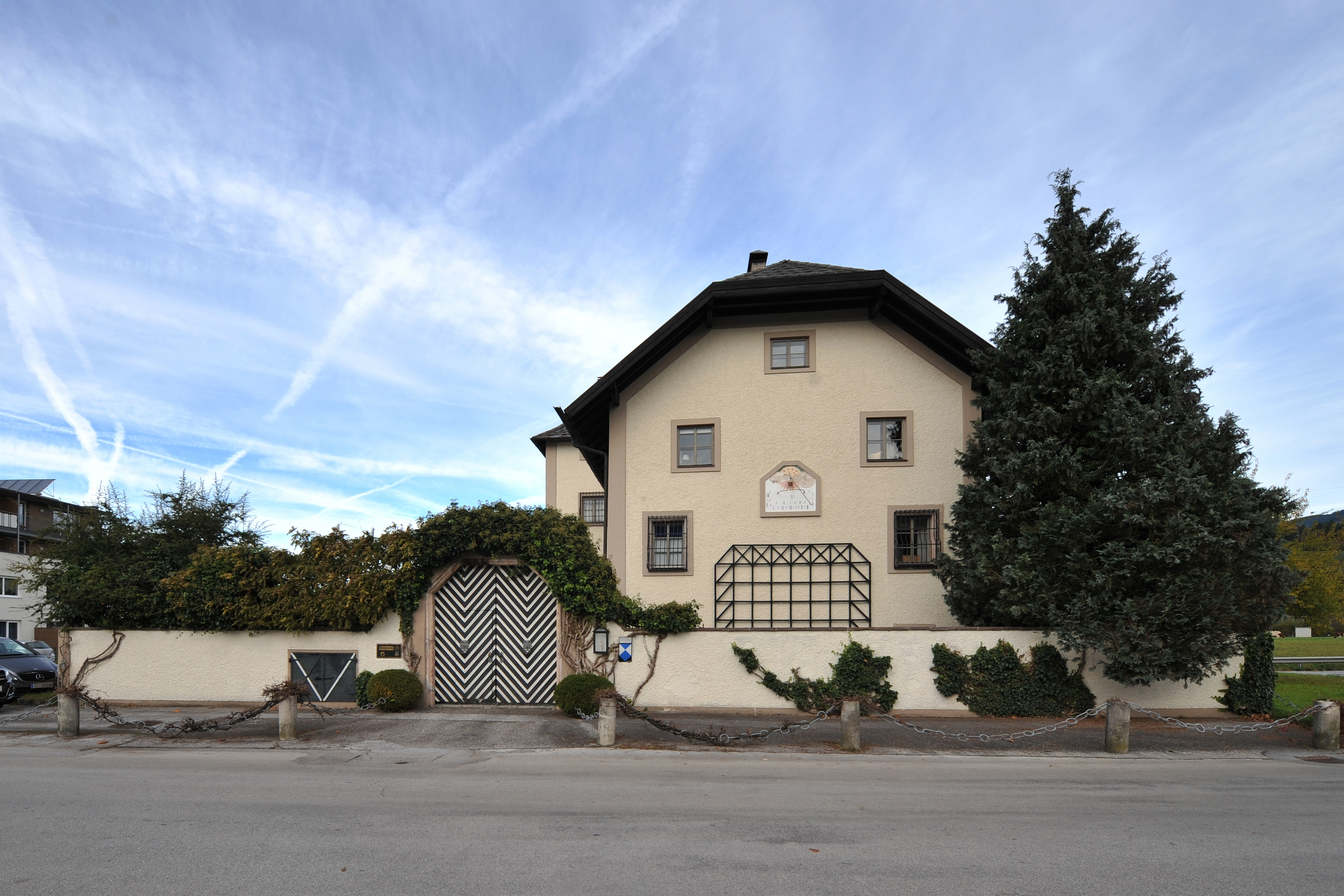 Annahof